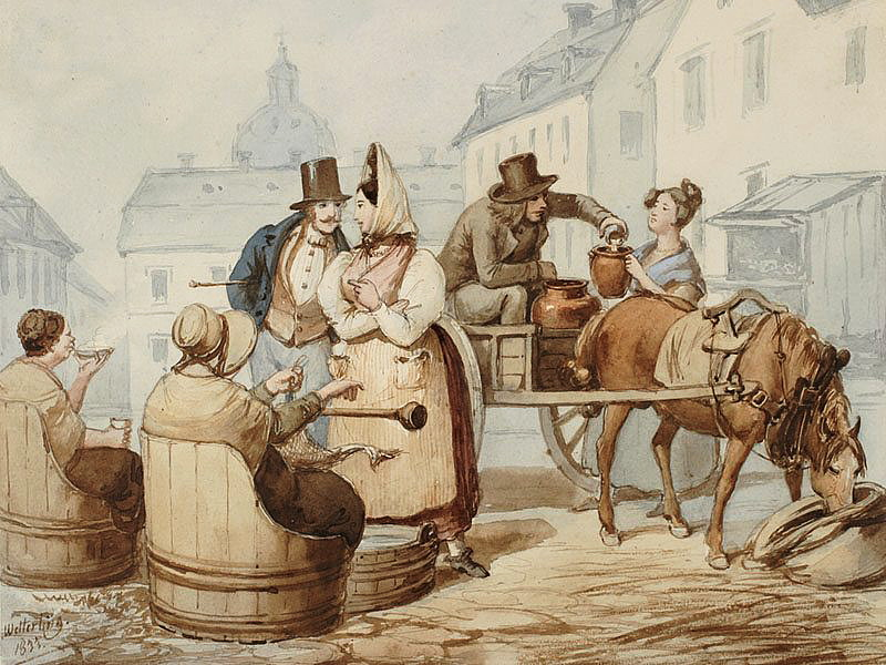 En scen från Hötorget i Stockholm